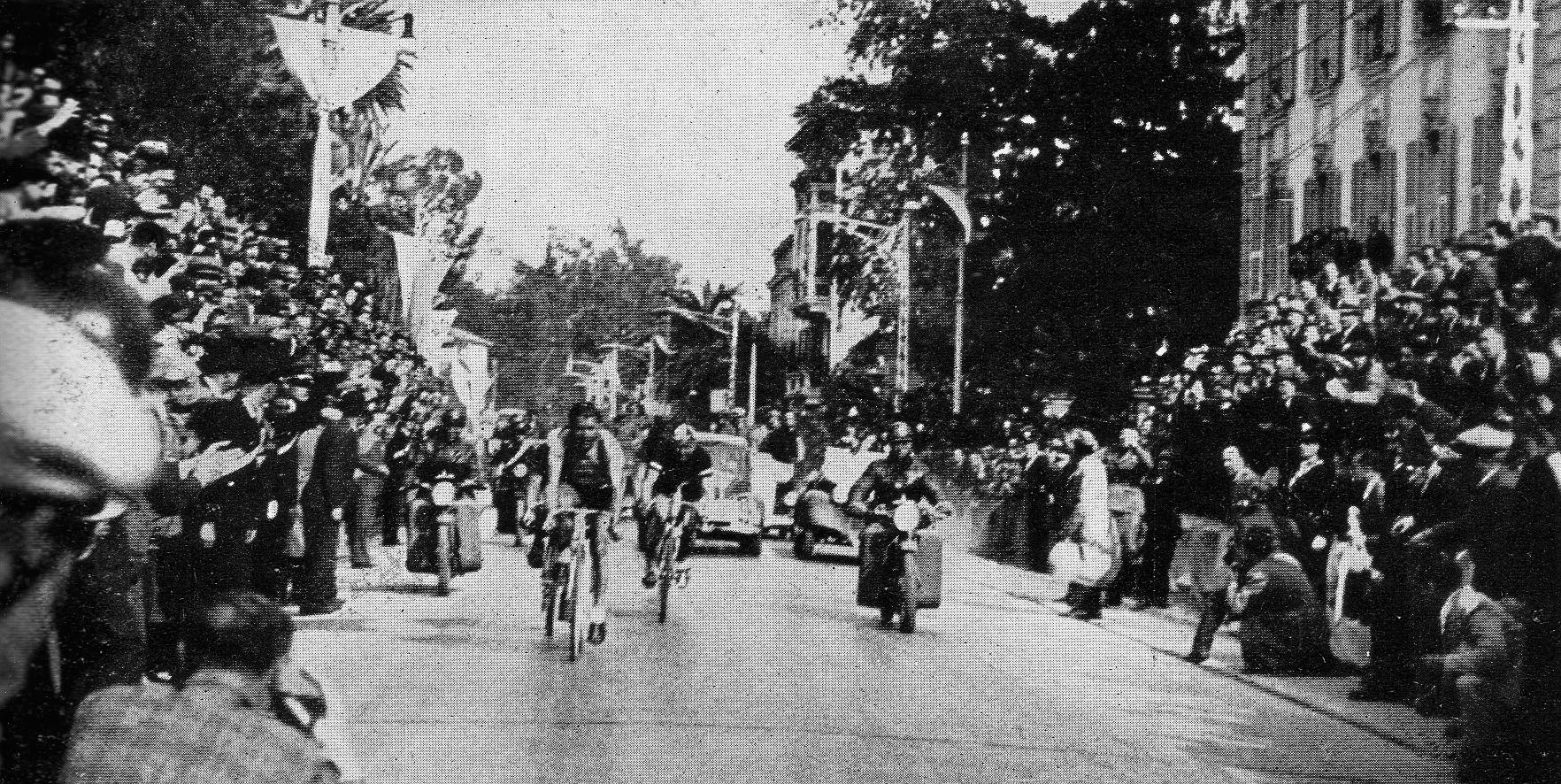 Arrivée de l'Italien Cavallotti à San Remo, en mars 1938 (lors de la course cycliste Milan-San Remo).